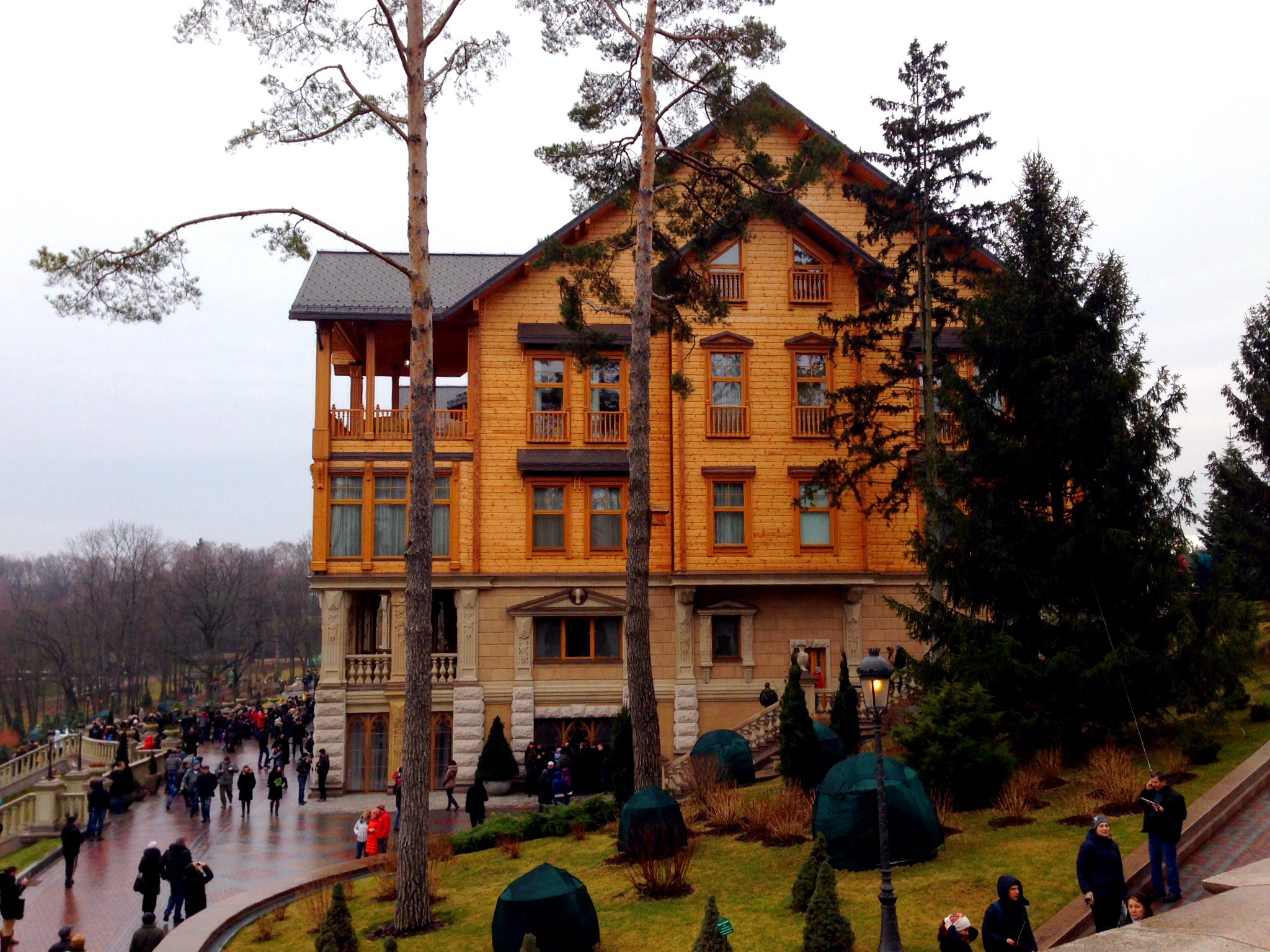 Honka in Mezhyhirya, side view